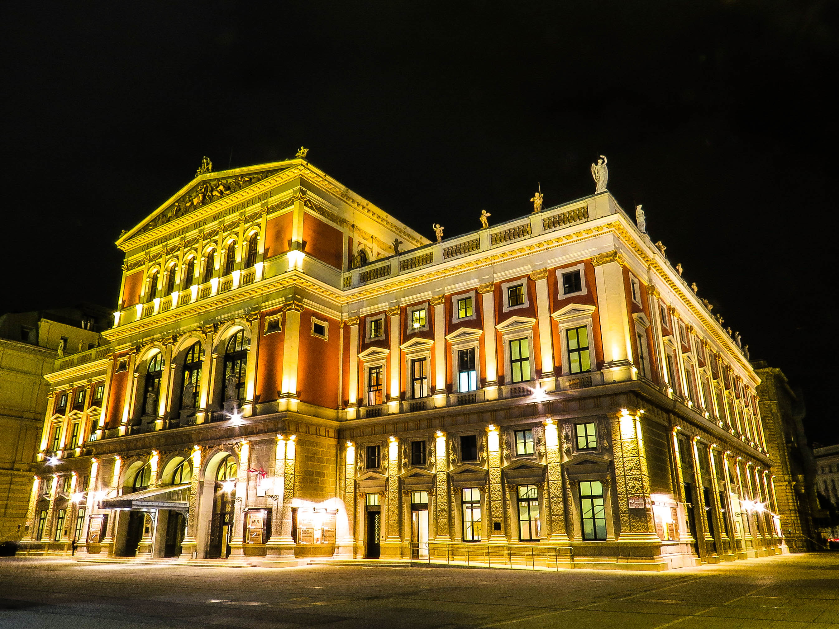 Wiener Musikverein